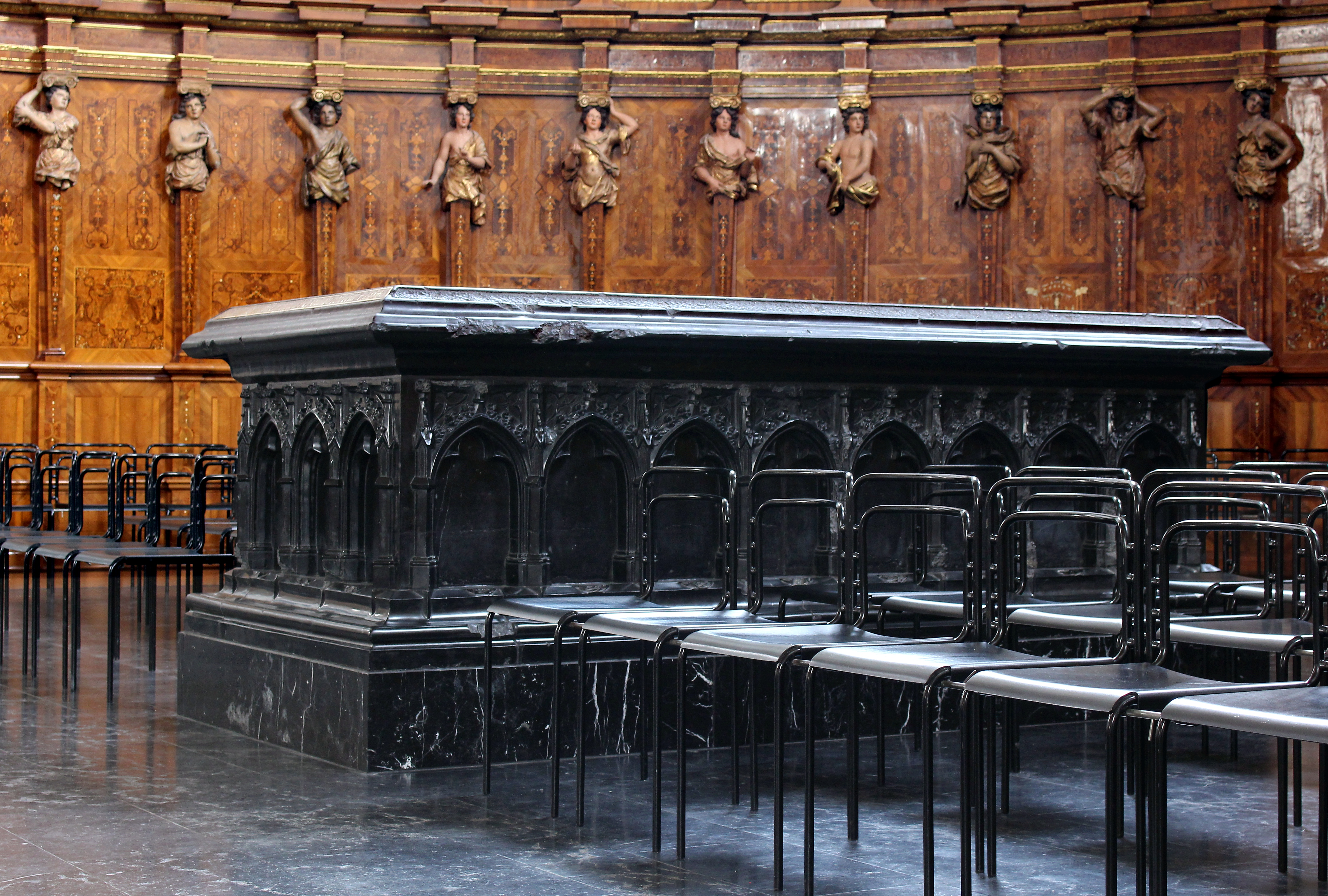 Tumba des Kurfürsten Balduin von Luxemburg in der Westapsis des Trierer Doms